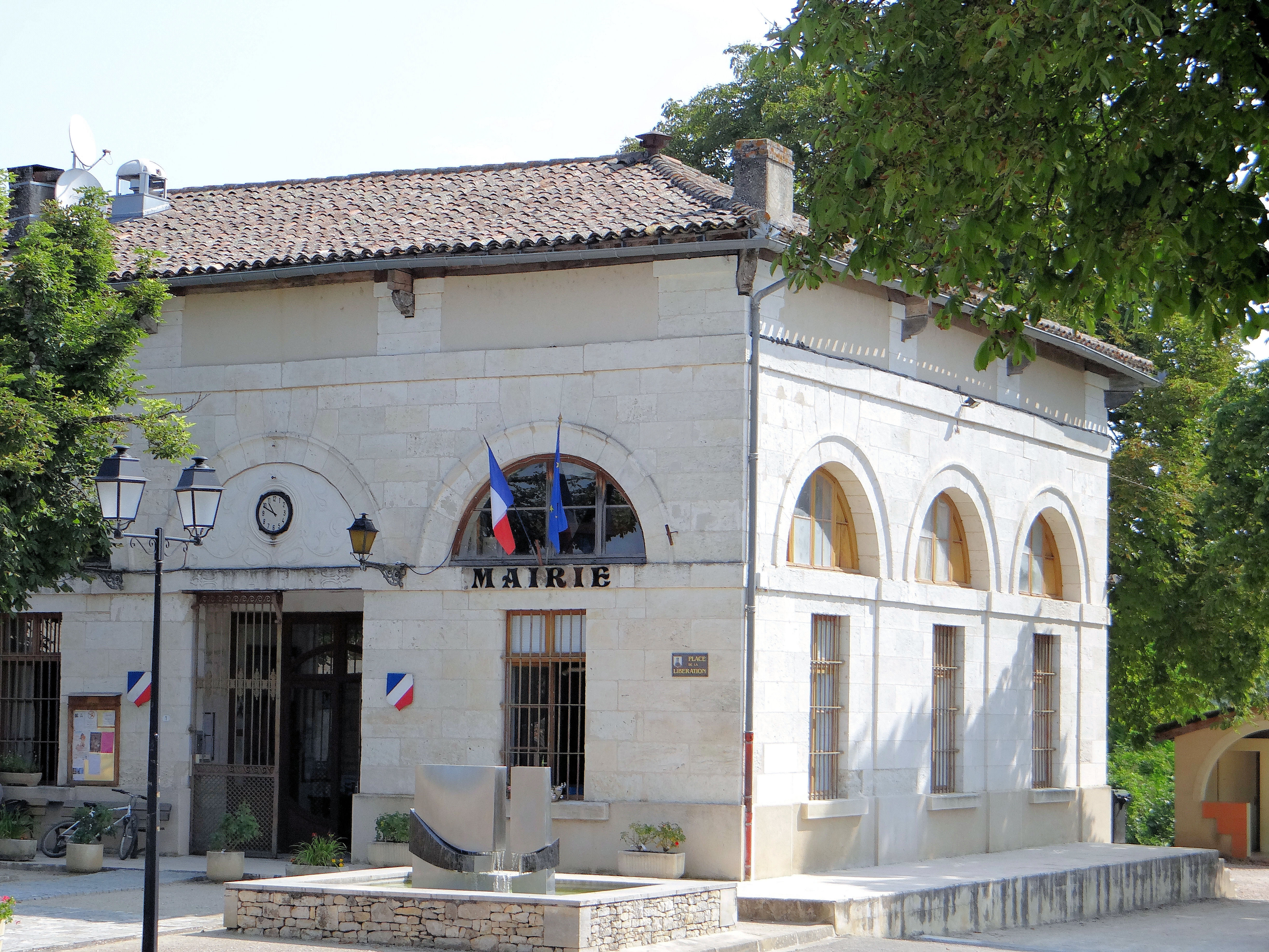 Puylaroque - Mairie